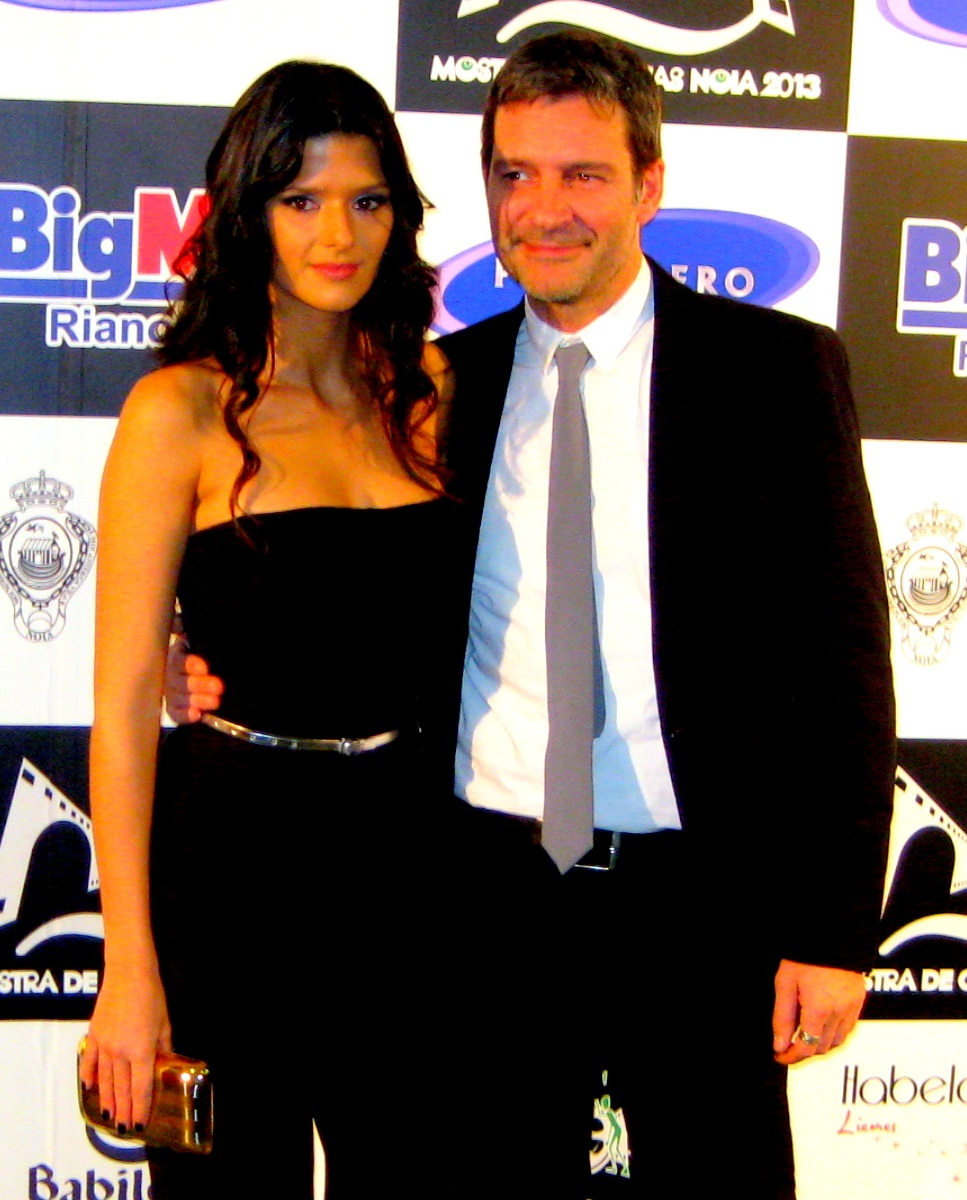 Sabela Arán e Monti Castiñeiras ectores españoles en 2013